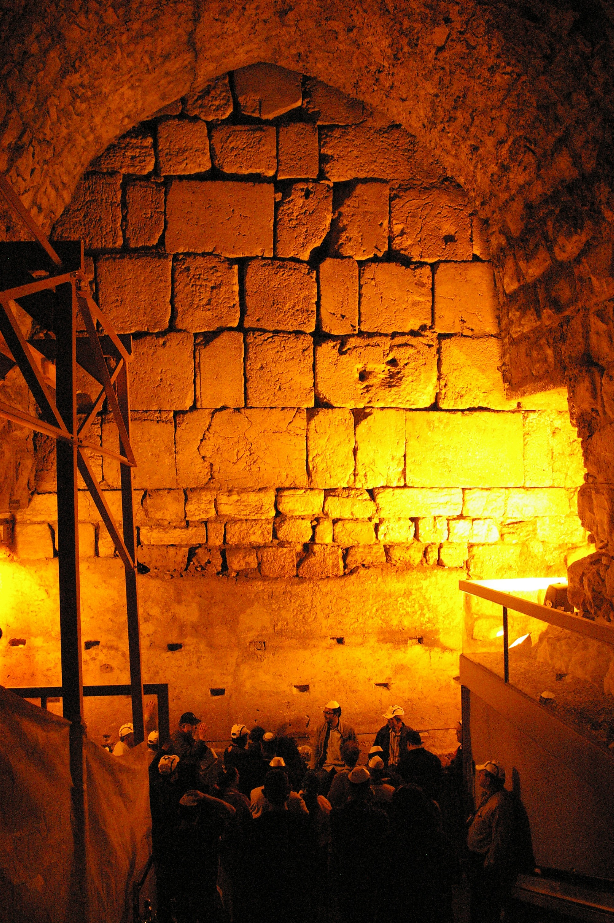 Vue du mur occidental dans sa partie souterraine